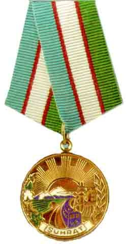 Узбекская медаль ШУхрат Кыргызча: Өзбекстандын Шухрат медалы